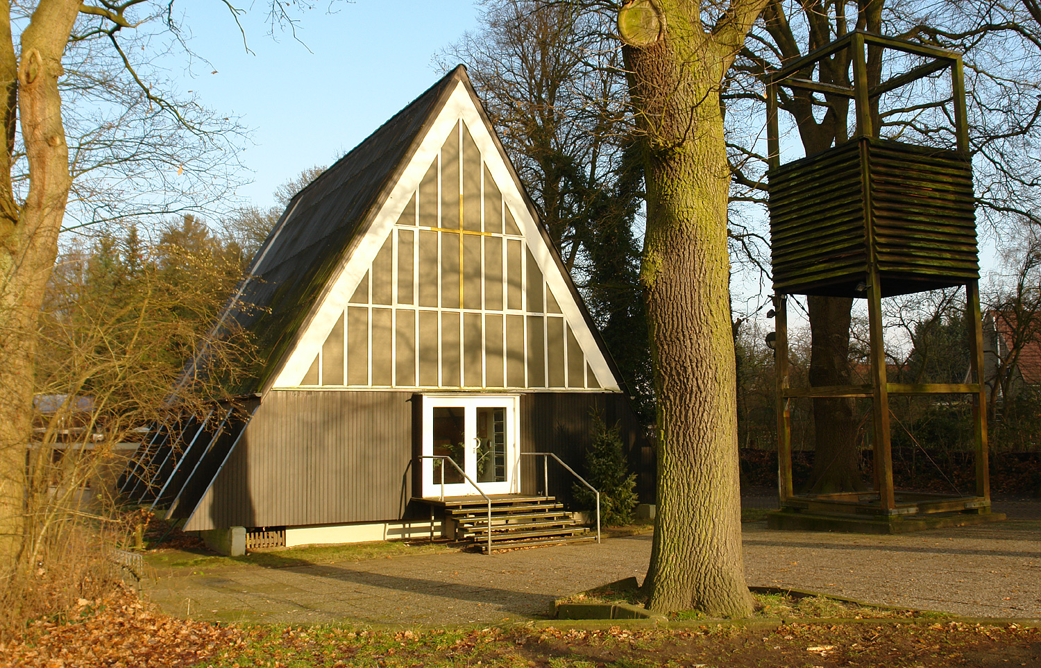 Holzkirche der St. Magni-Gemeinde in Bremen-Schönebeck, Feldberg. Diese sogenannte Montagekirche wurde 1964 nach einem Typenentwurf des Düsseldorfer Architekten Helmut Duncker gebaut und wird noch genutzt.